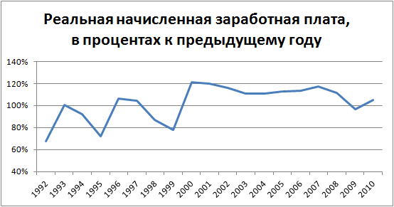 Реальная начисленная заработная плата, в процентах к предыдущему году (1992-2010). Источники